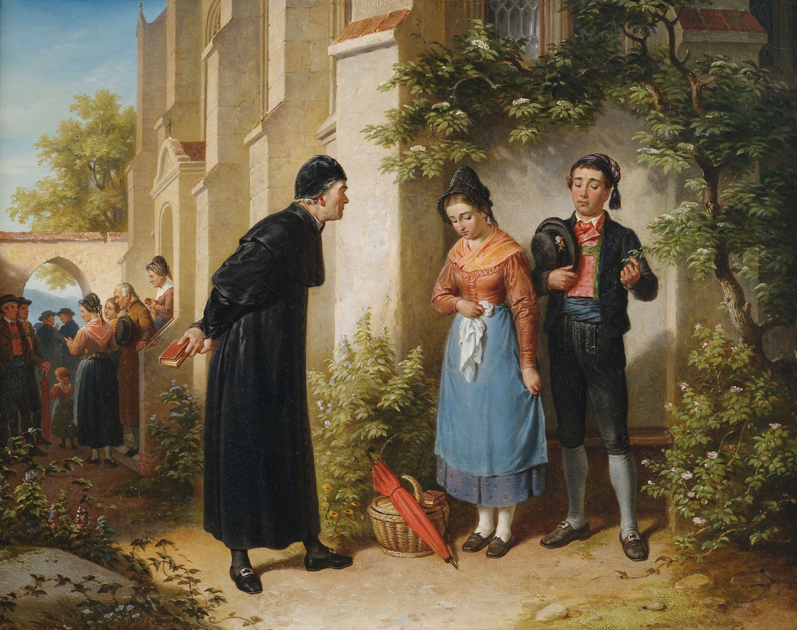 Ein junges Paar wird vom Pfarrer zurechtgewiesen.